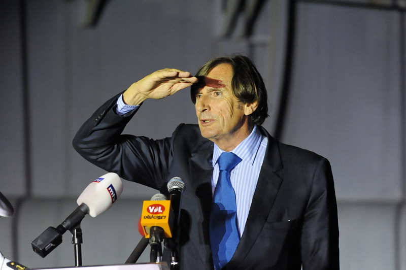 Daniel Rondeau à Beyrouth en 2009.